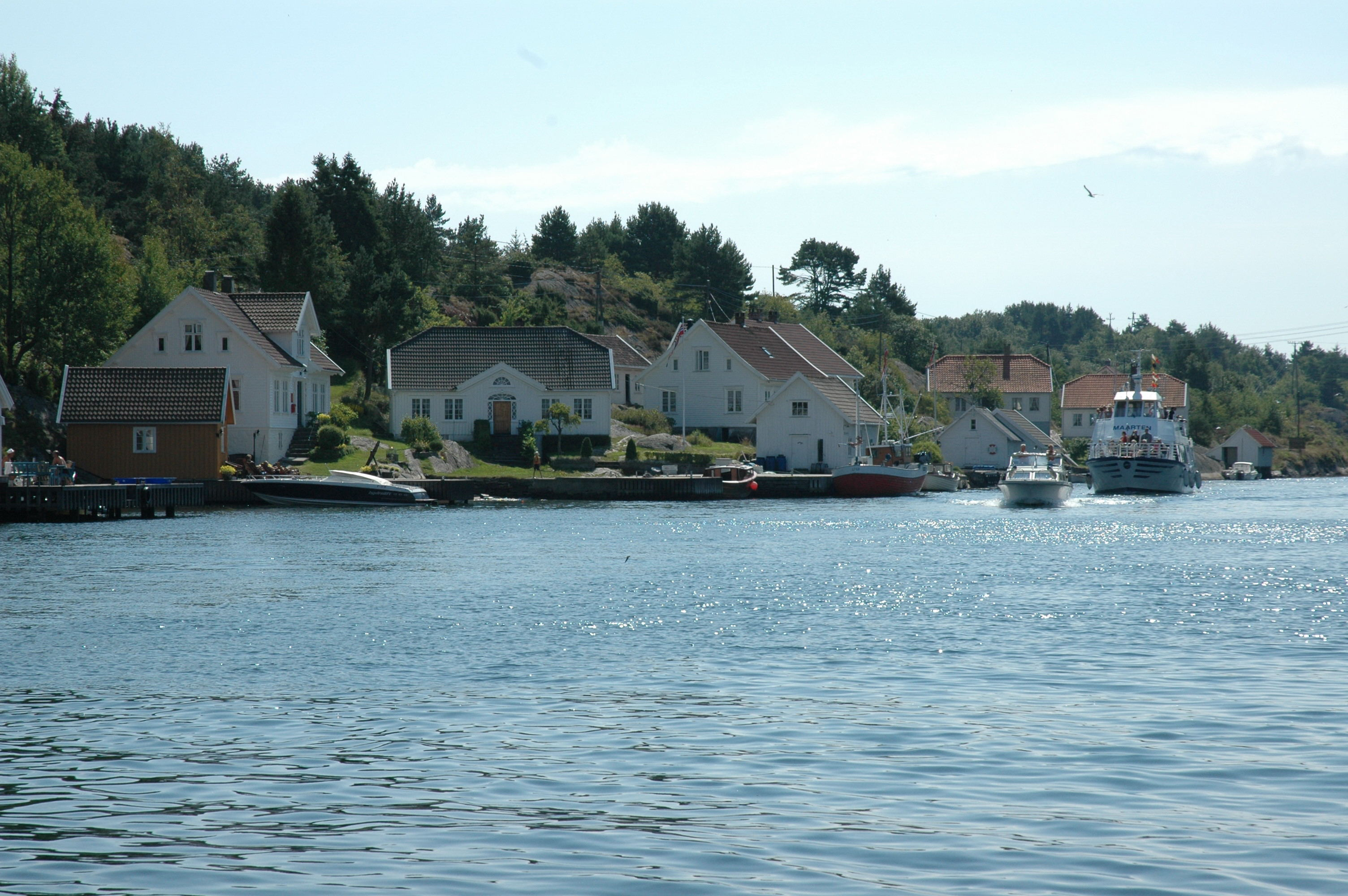 Skippergada, Kristiansand Norway